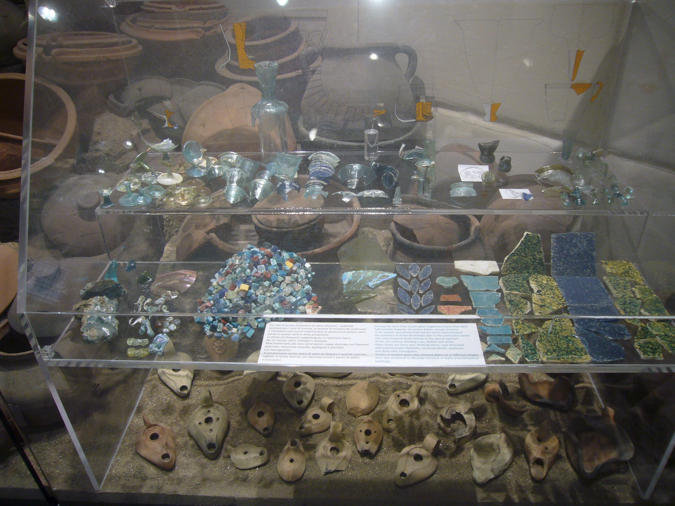 Roma, Crypta Balbi: materiali provenienti dalle botteghe di VII secolo.